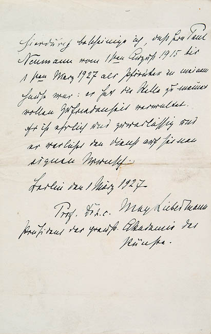 Handschriftliches Arbeitszeugnis Max Liebermanns für seinen Pförtner am Pariser Platz in Berlin, 1. März 1927 Hierdurch bescheinige ich, daß Herr Paul Neumann vom 1sten August 1915 bis 1sten März 1927 als Pförtner in meinem Hause war: er hat die Stelle zu meiner vollen Zufriedenheit verwaltet. Er ist ehrlich und zuverlässig und er verläßt den Dienst auf seinen eigenen Wunsch. Berlin den 1 März 1927 Prof. Dr. h. c. Max Liebermann Präsident der preuß. Akademie der Künste